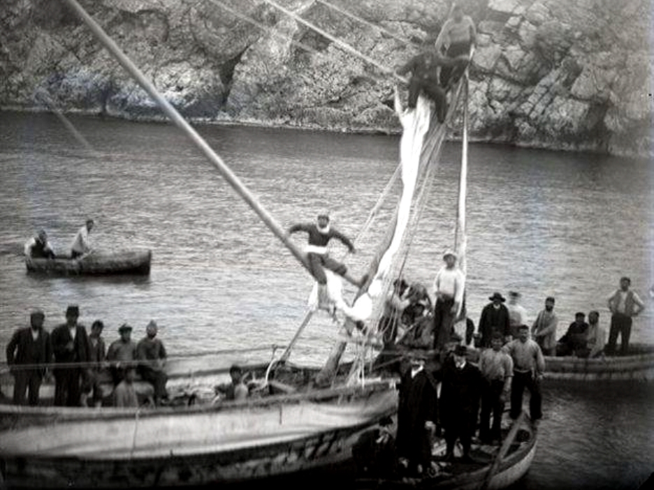 Untersuchung des antiken Schiffswracks von Antikythera auf einem zeitgenössischen Foto, aufgenommen im Winter 1900/1901